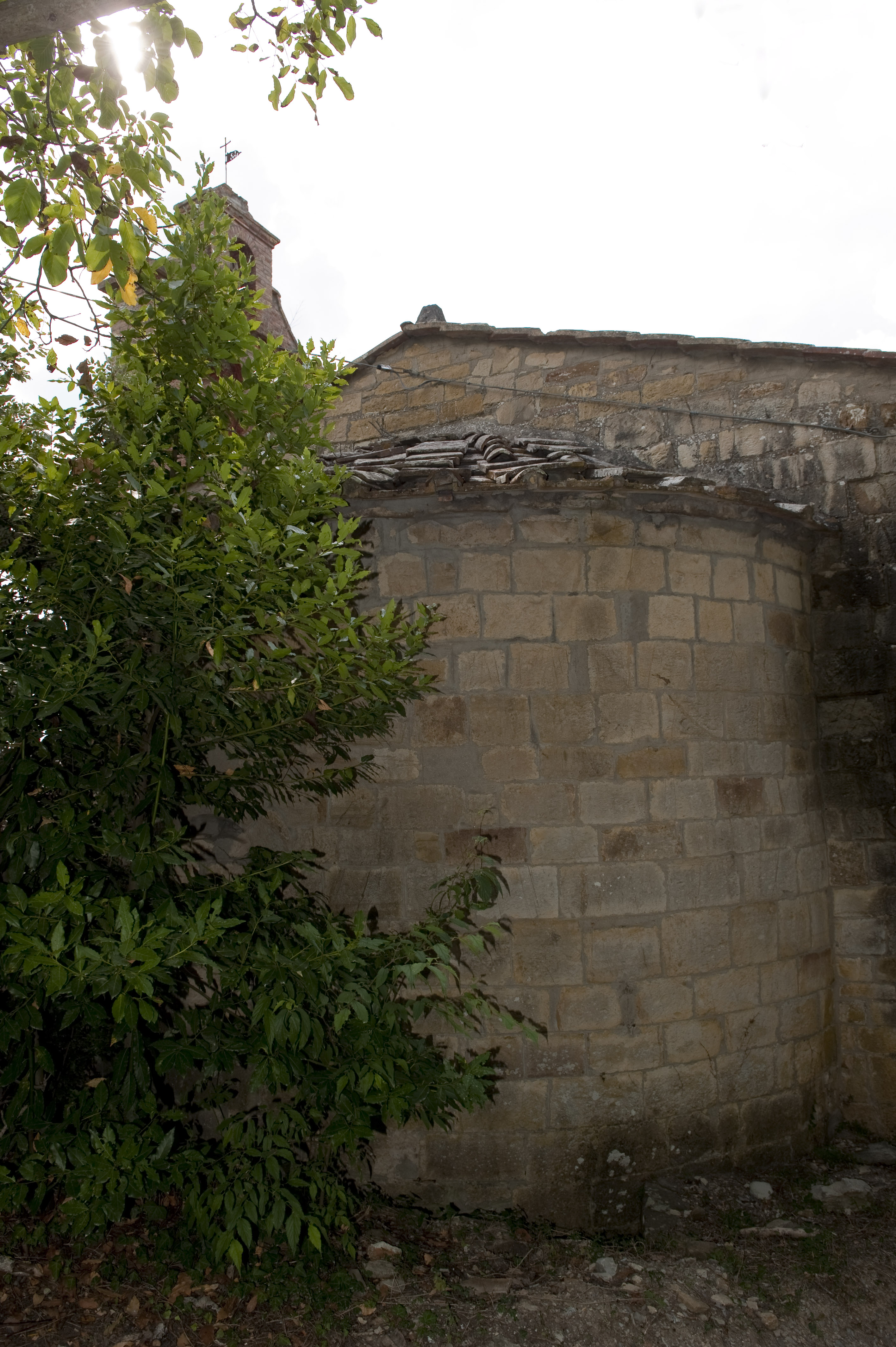 Abside della chiesa di San Quirico a Monternano, Castellina in Chianti